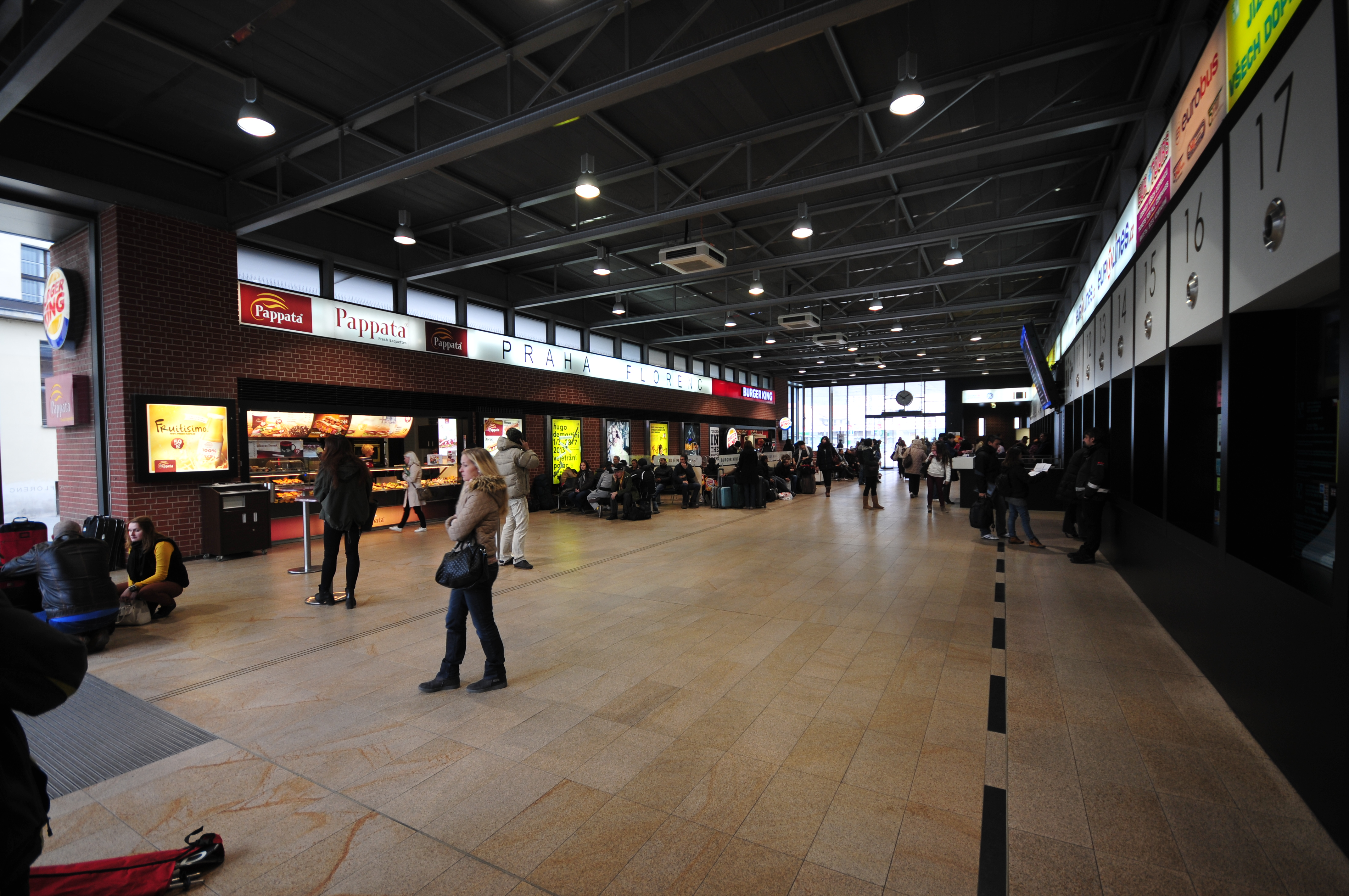 Autobusové nádraží Praha Florenc